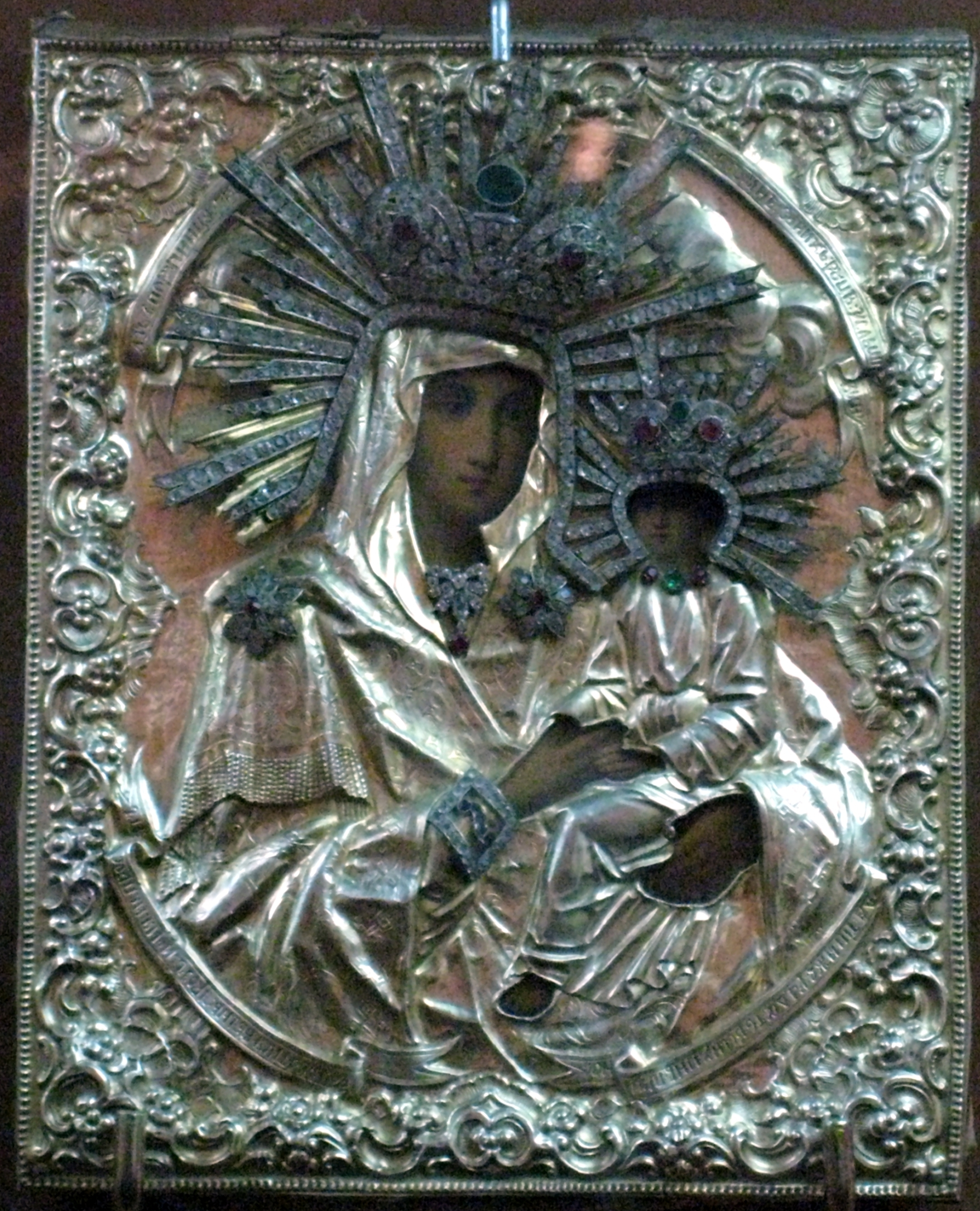 Икона Богоматери ("Споручница грешных"?). Кирилло-Белозерский монастырь